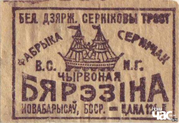 Запалкавы карабок Чырвонай Бярэзіны